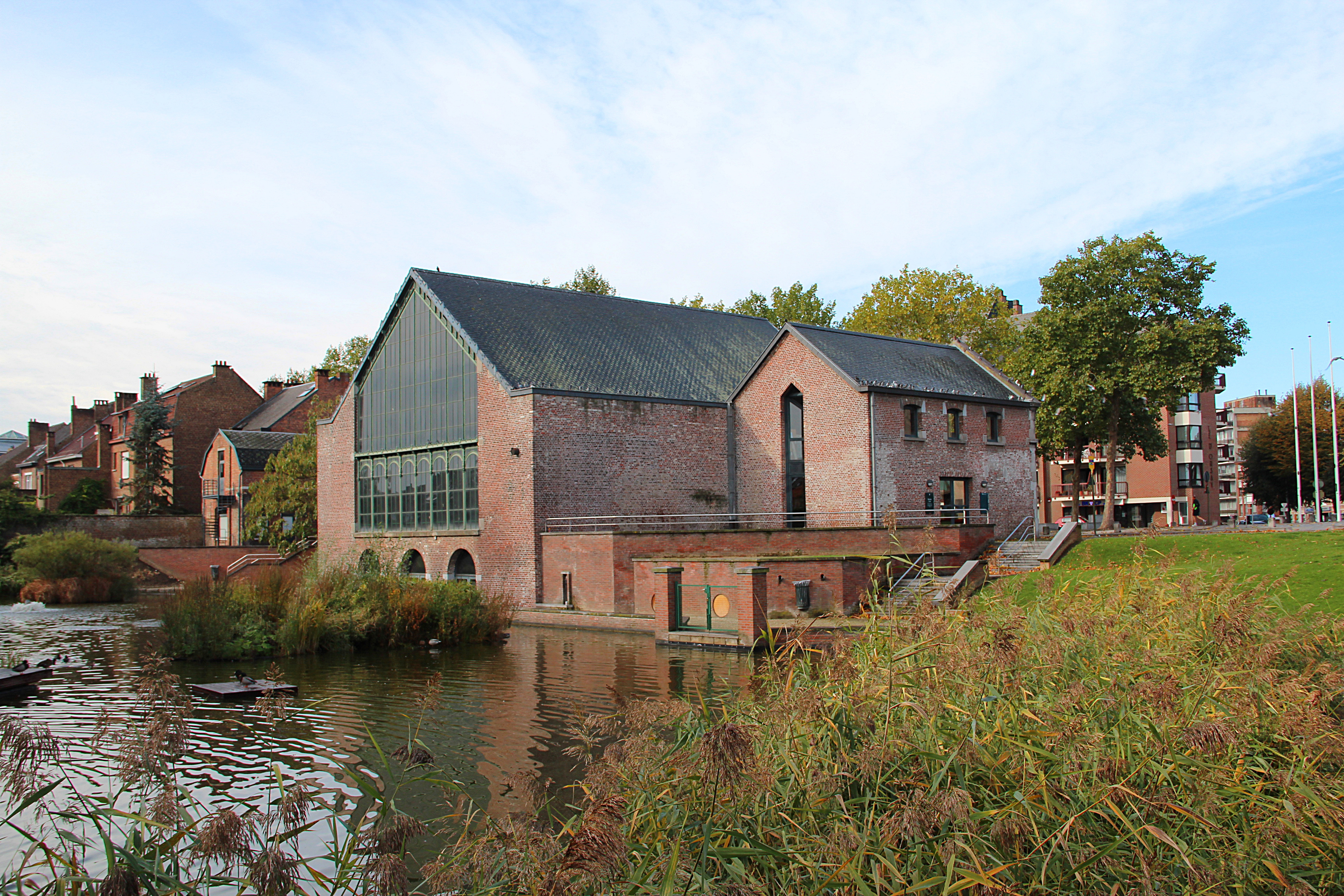 Mons (Hainaut) (Belgique), Boulevard Dolez - Parcelles entourant la machine à eau. 3″ N, 3° 57′ 27.9″ E